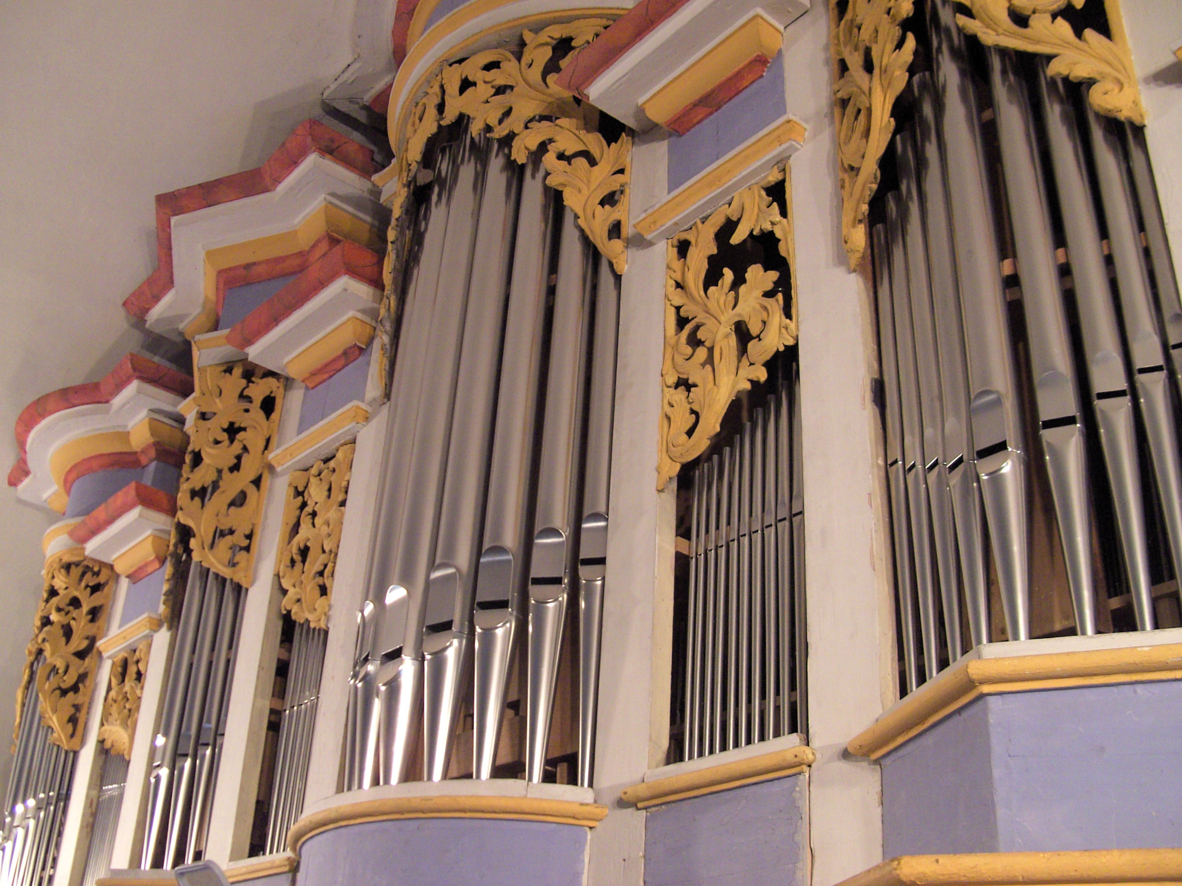 Rekonstruiertes Orgelwerk